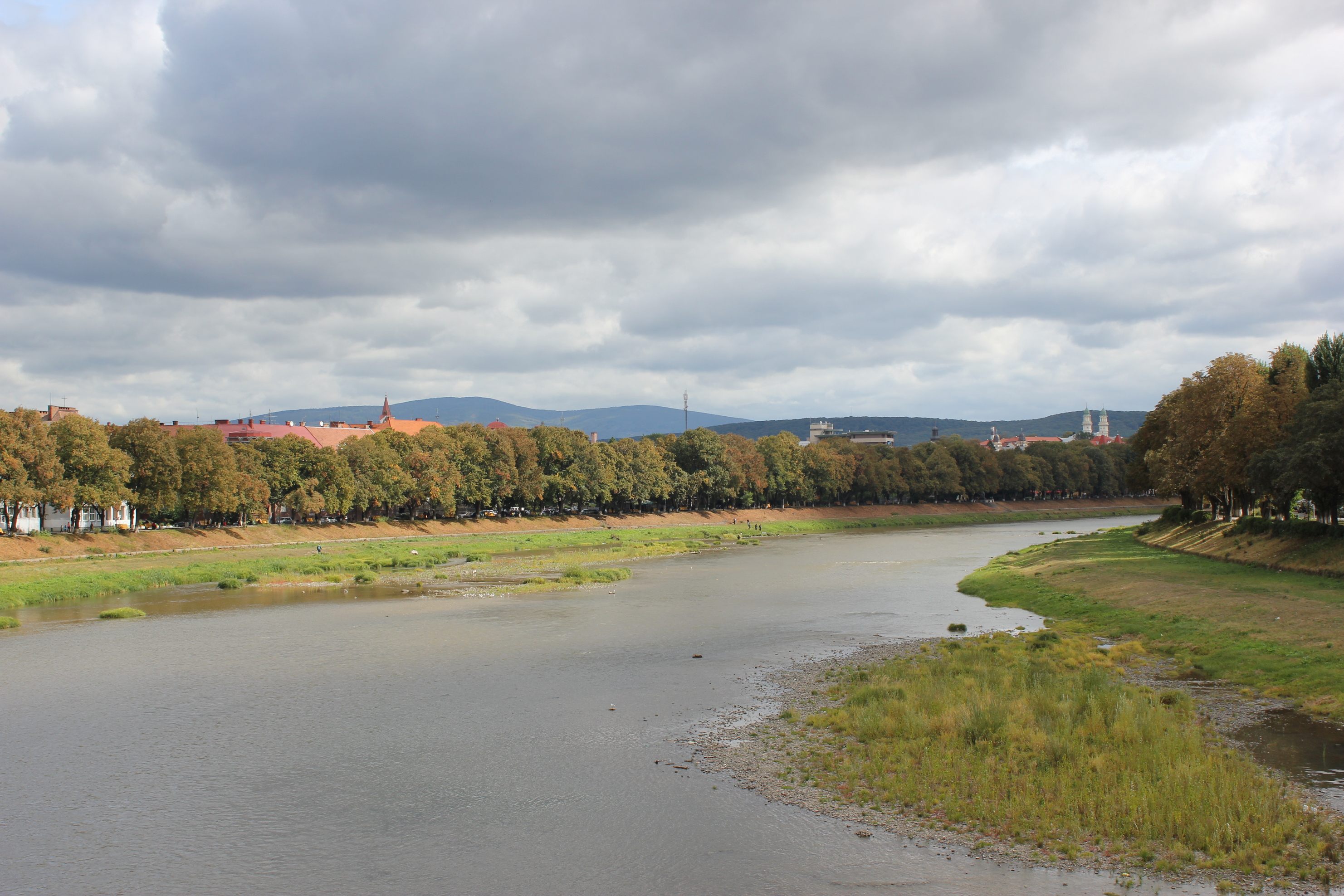 Річка Уж в Ужгороді.